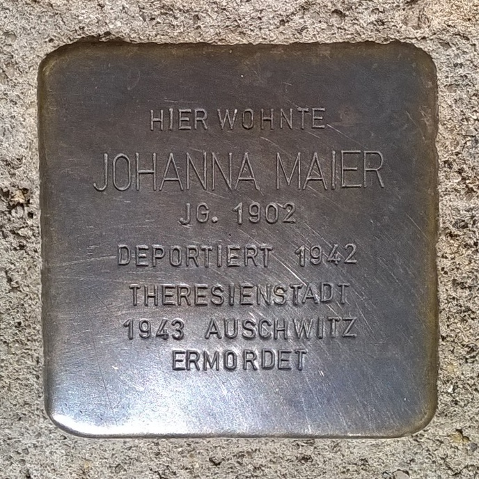 Stolperstein für Johanna Maier in D-74081 Heilbronn(-Horkheim), Hohenloher Straße 15